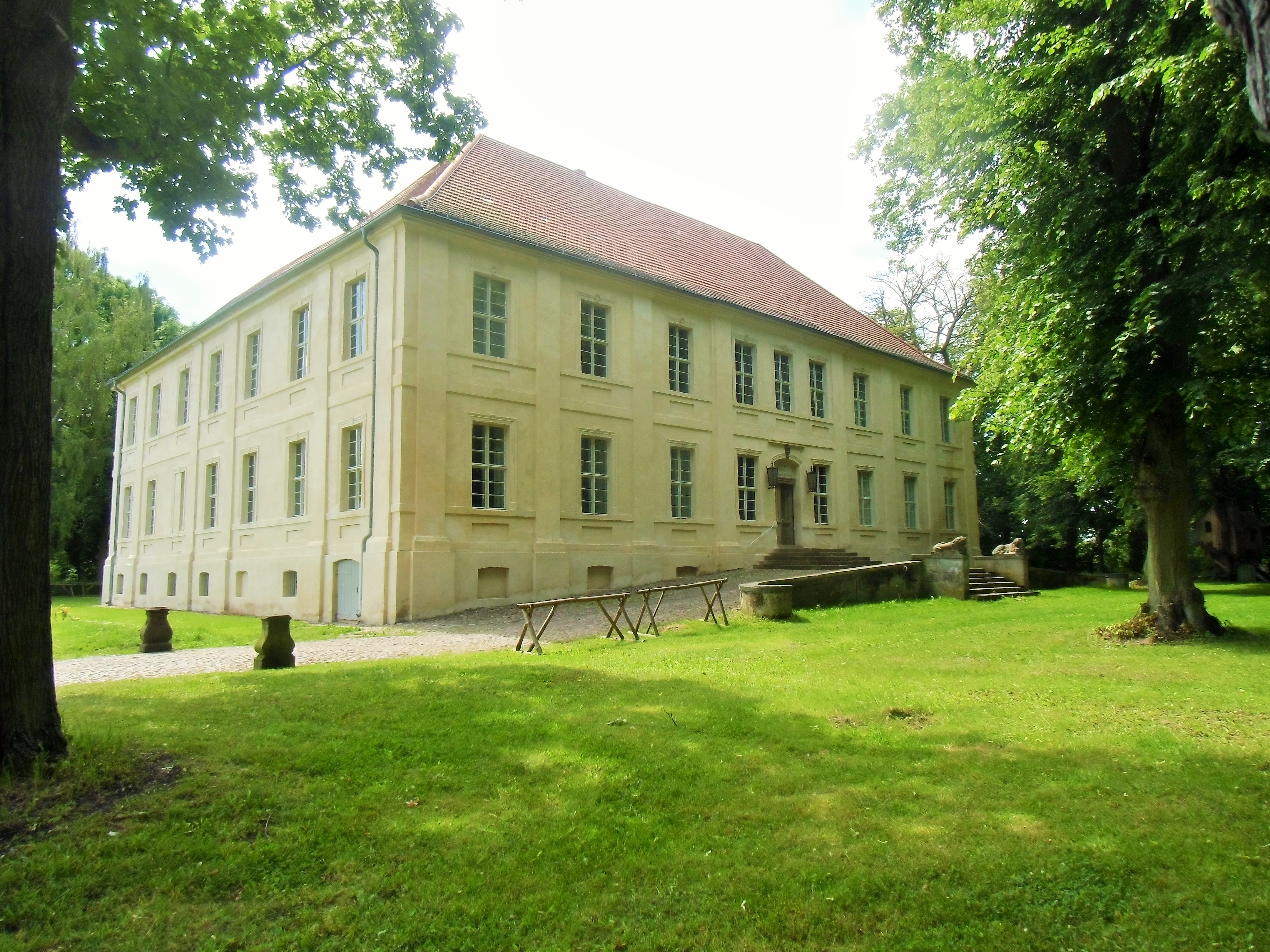 Denkmalgeschütztes Gutshaus beziehungsweise Schloss von Schwante, erbaut 1741 bis 1743